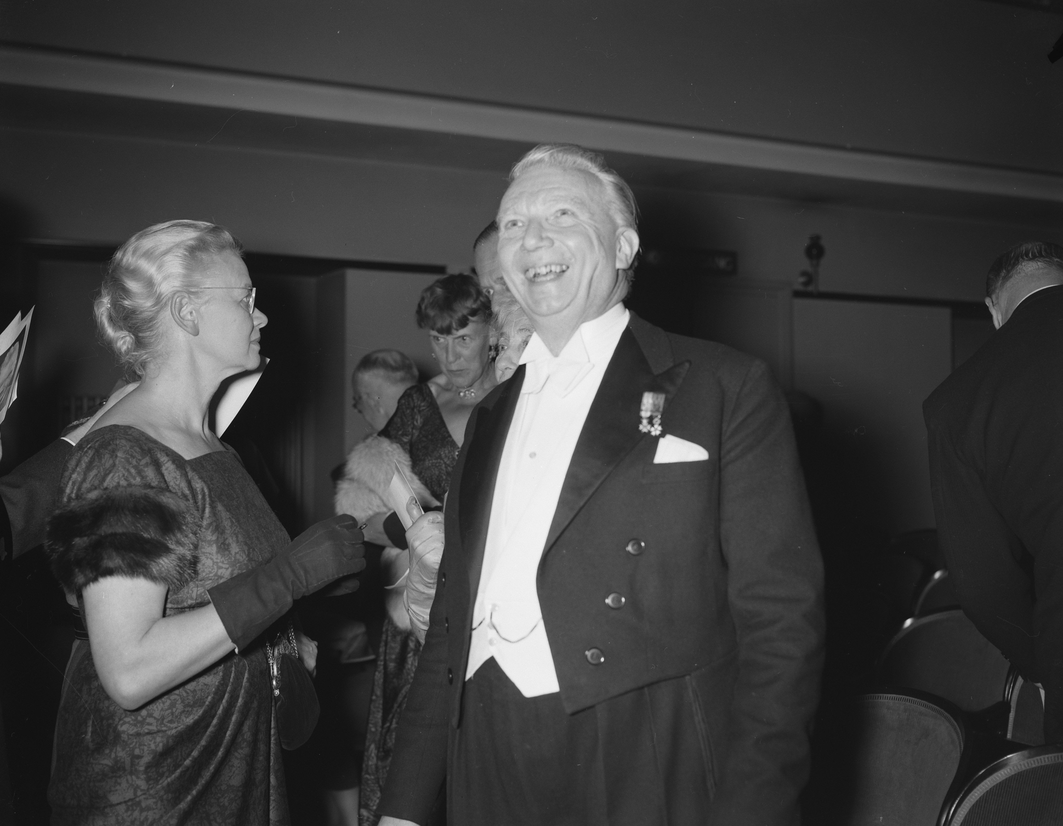 Collectie / Archief : Fotocollectie Anefo Reportage / Serie : [ onbekend ] Beschrijving : Huldiging Willem Andriessen in de Bachzaal te Amsterdam Datum : 29 oktober 1957 Locatie : Amsterdam, Noord-Holland Trefwoorden : componisen, huldigingen Persoonsnaam : Andriessen, Willem Fotograaf : Bilsen, Joop van / Anefo Auteursrechthebbende : Nationaal Archief Materiaalsoort : Negatief (zwart/wit) Nummer archiefinventaris : bekijk toegang 2.24.01.04 Bestanddeelnummer : 909-0678